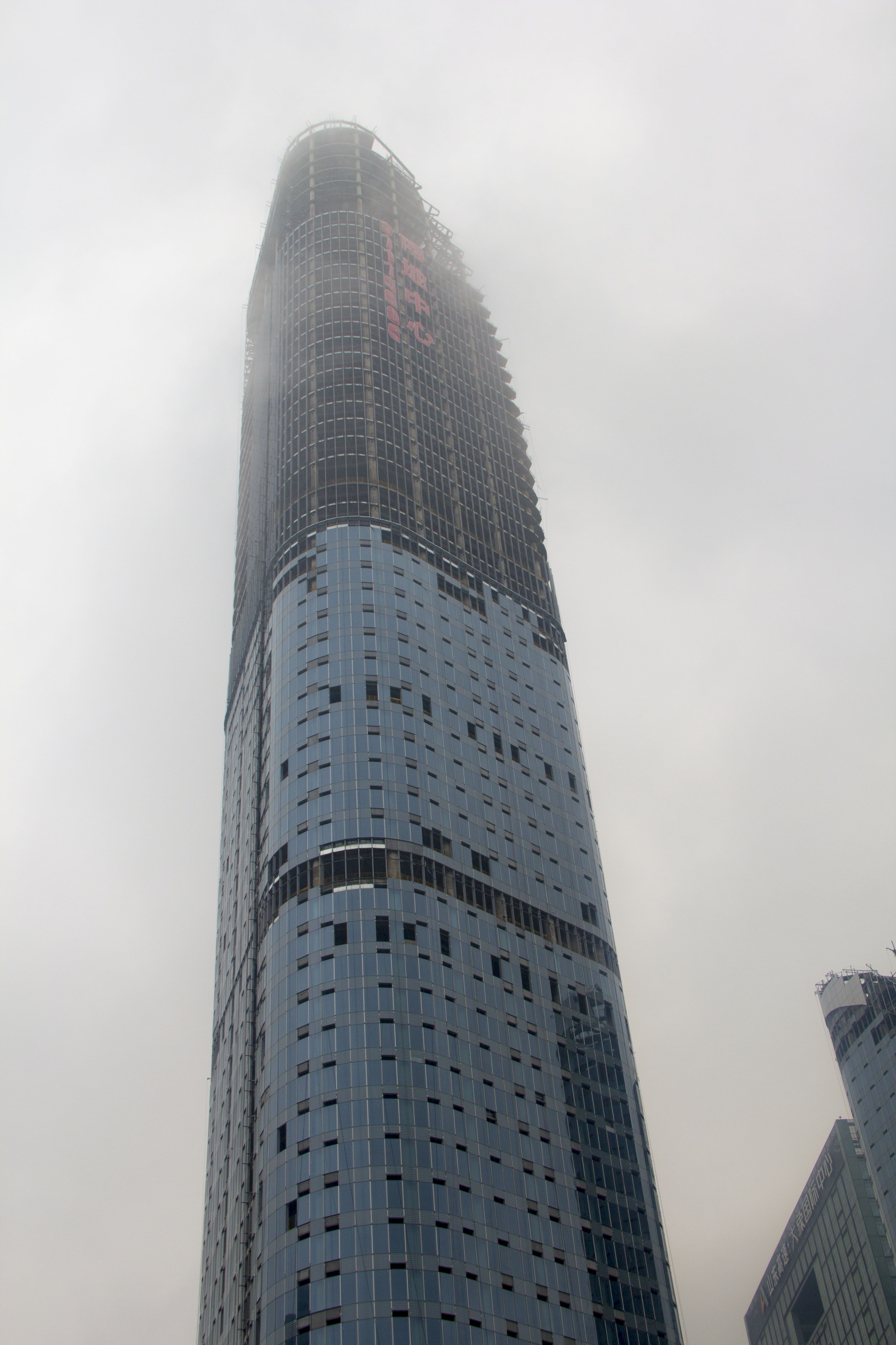 钱江世纪城，雨